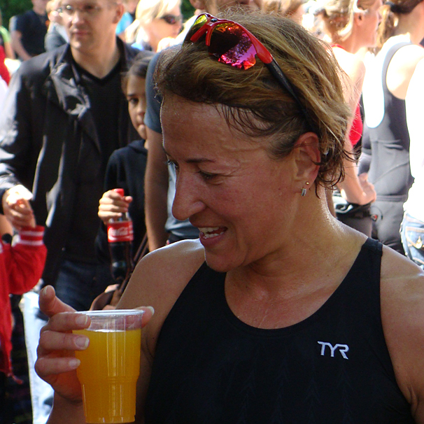 Anita Lenti beim „Luschnouar Ironmännli“ (im Juni 2009)